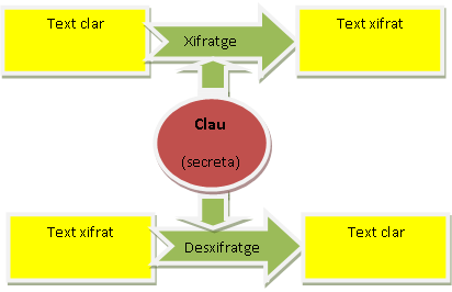 Esquema per il·lustrar el xifratge simètric